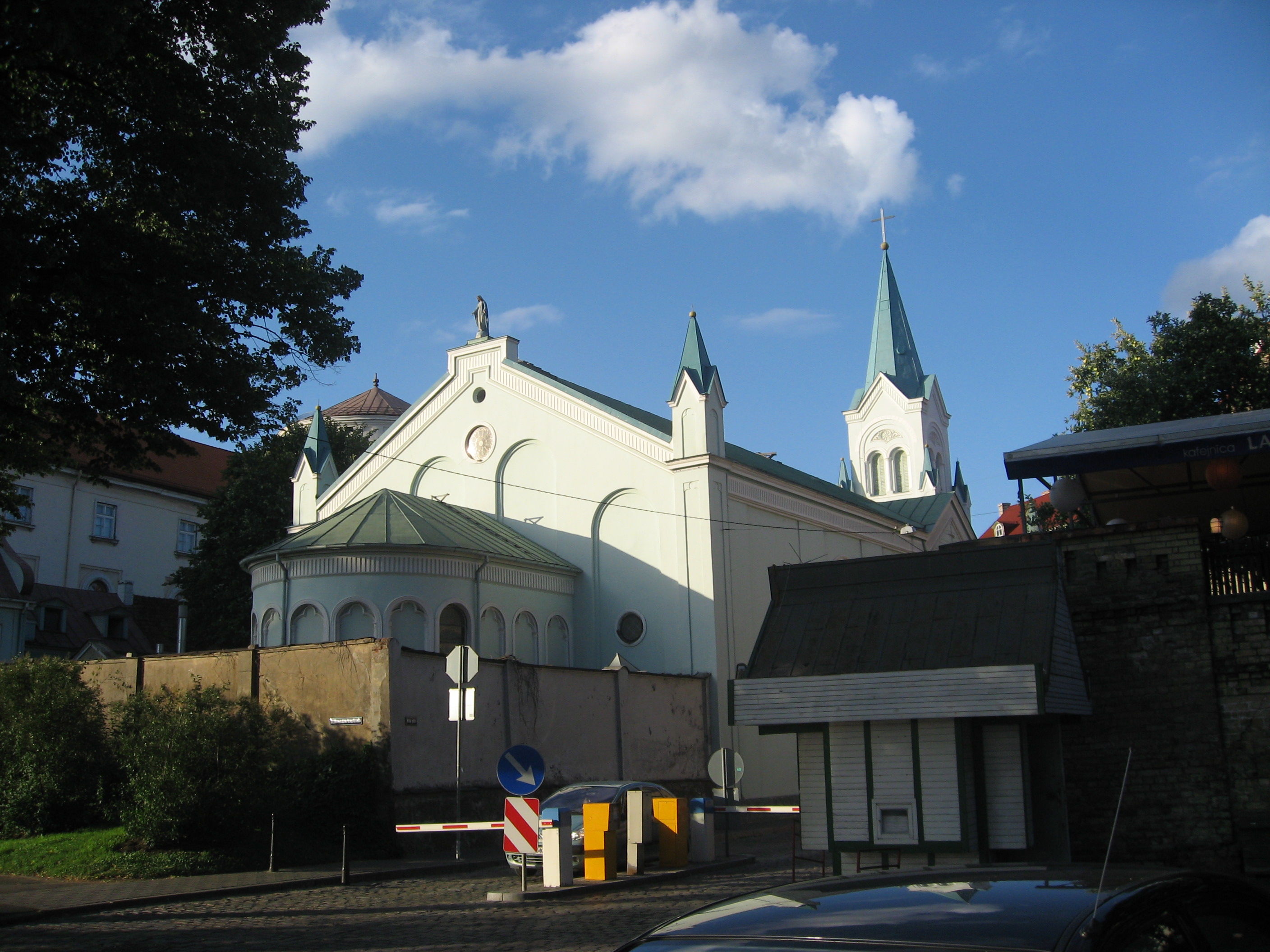 Sāpju Dievmātes Romas katoļu baznīca